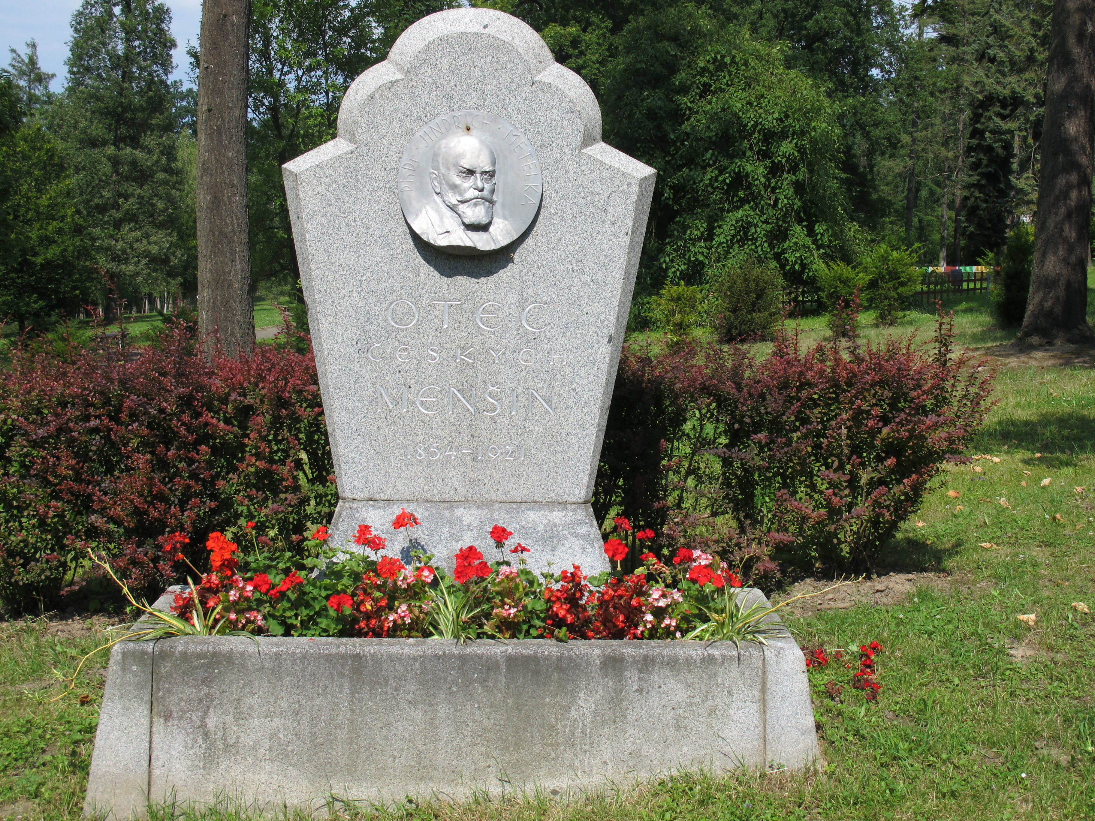 Metelkovy sady v Turnově